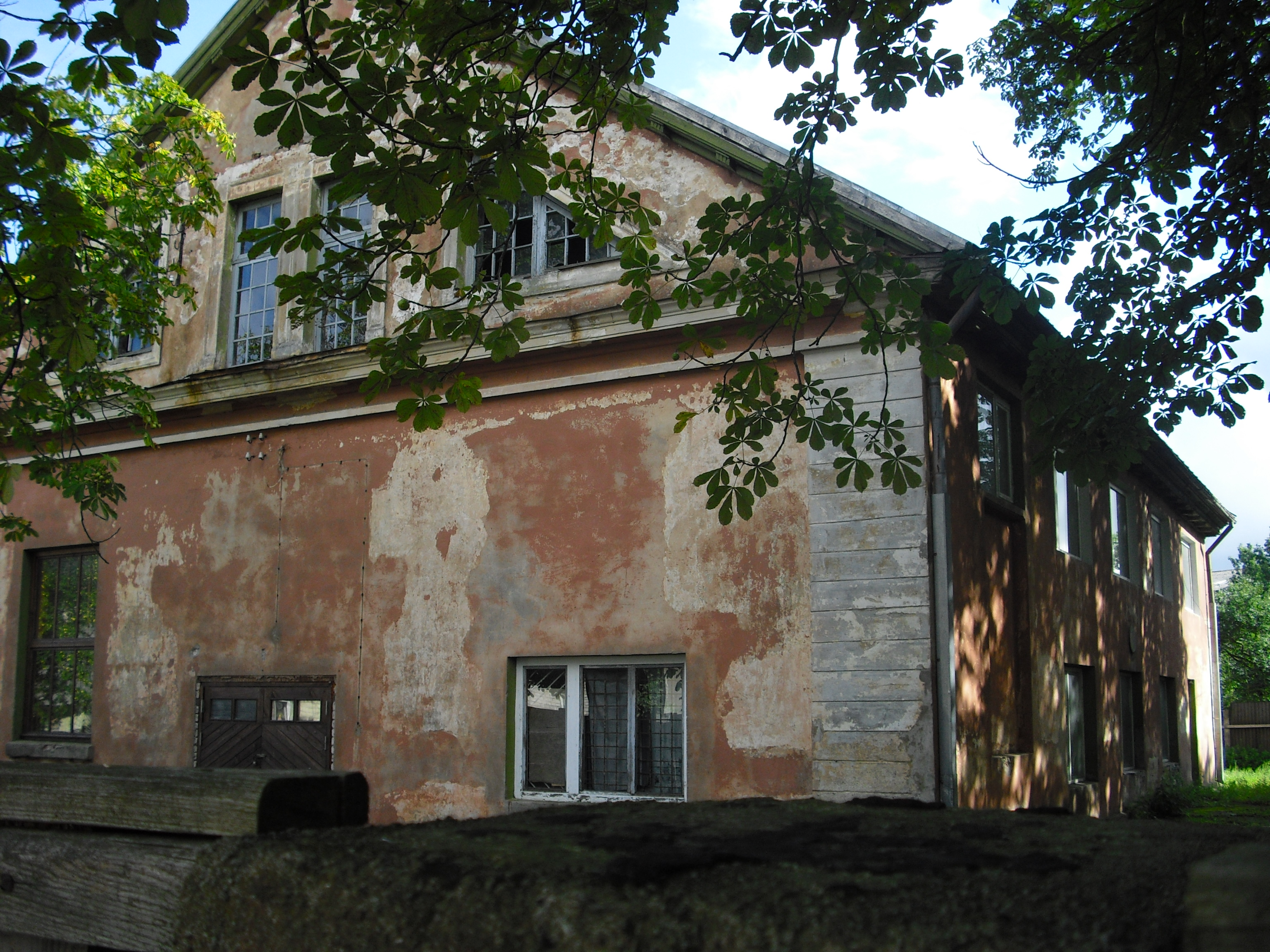 Ehemalige Synagoge der jüdischen Gemeinde Ventspils (lettland)